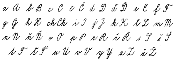 Normalizované psací písmo používané v Česku.